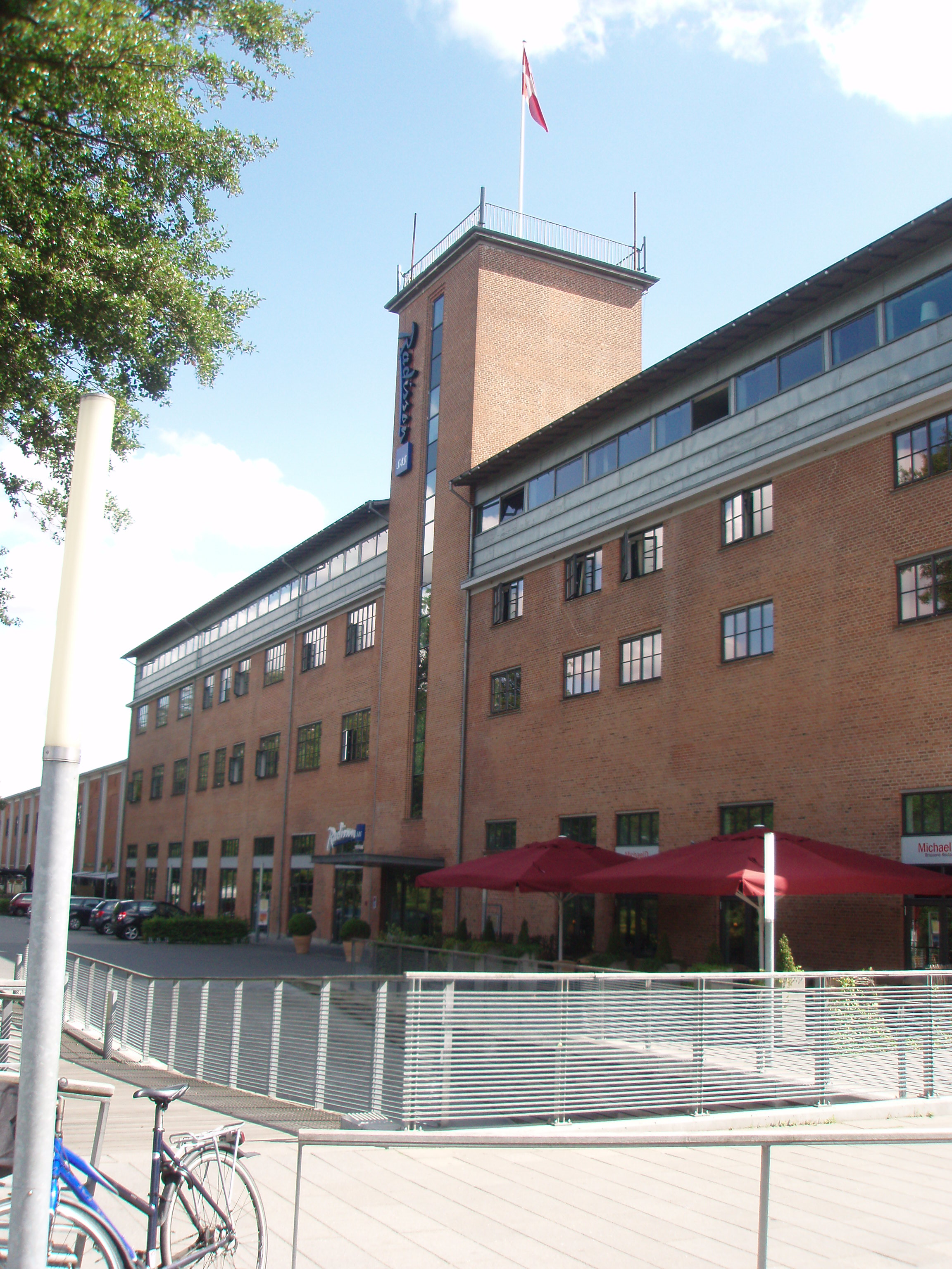 Silkeborg Papirfabrik